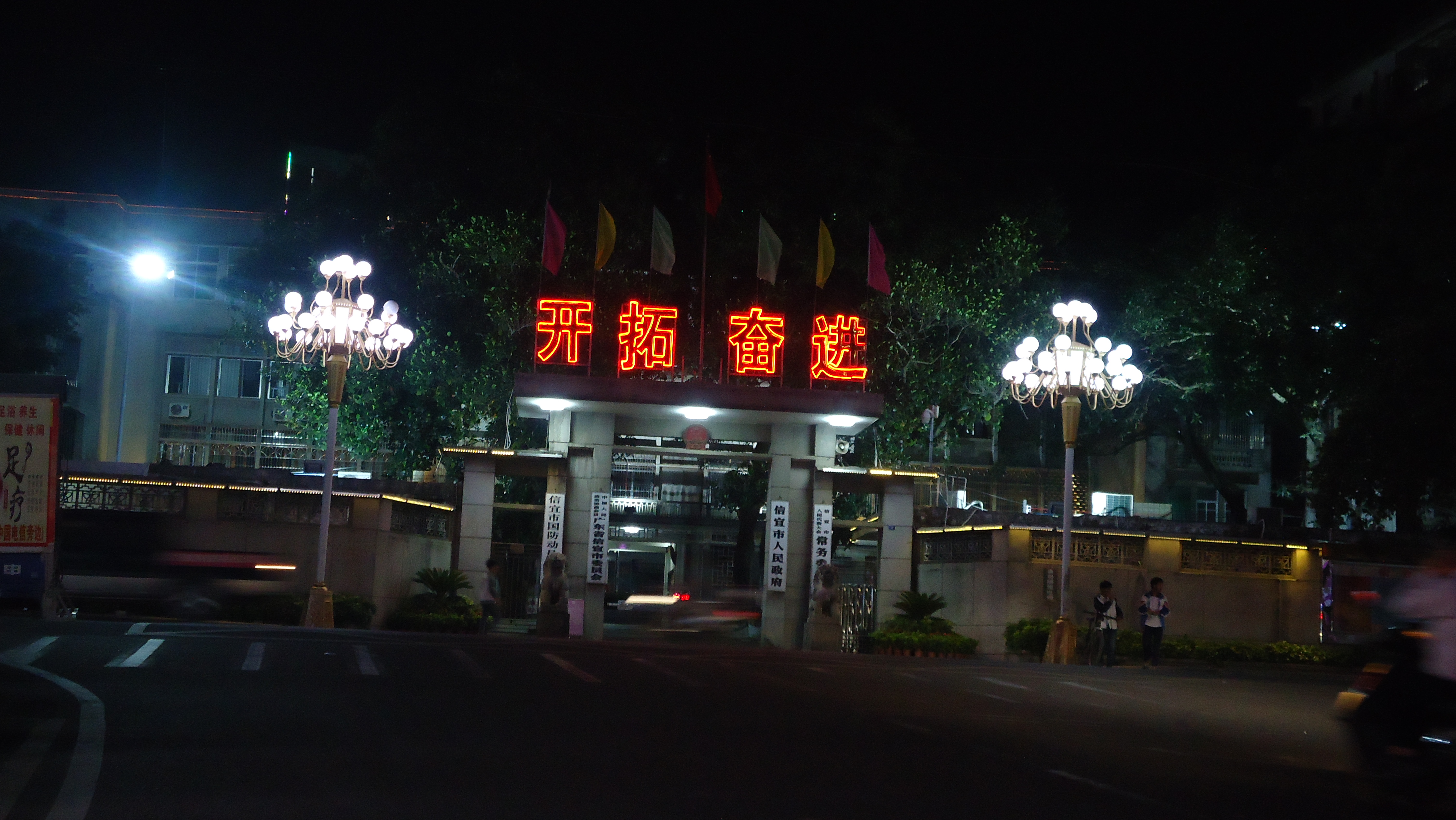 中文（中国大陆）: 信宜市市政府门口。